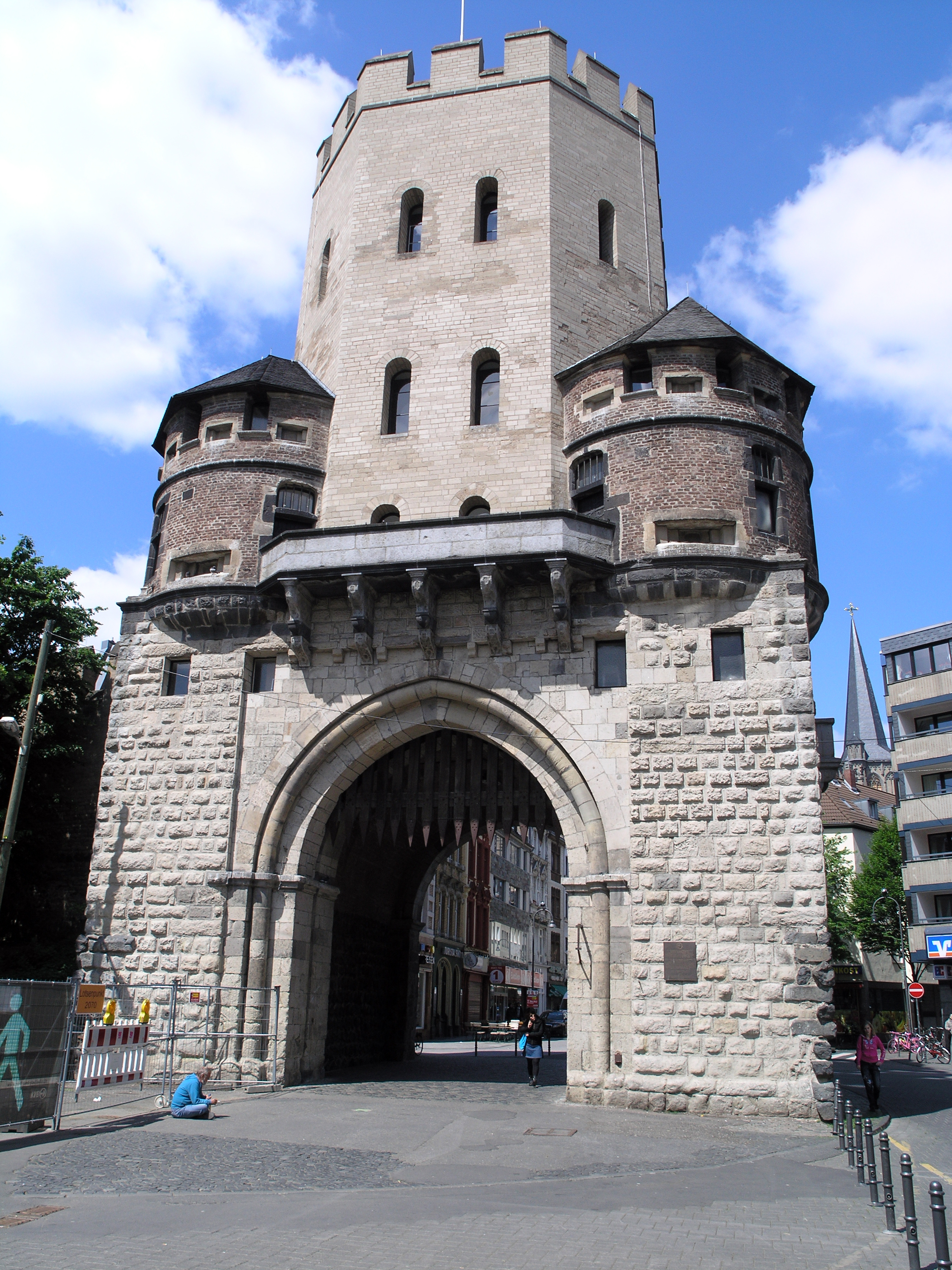 Северный Рейн-Вестфалия, Кёльн – Ворота Святого Северина